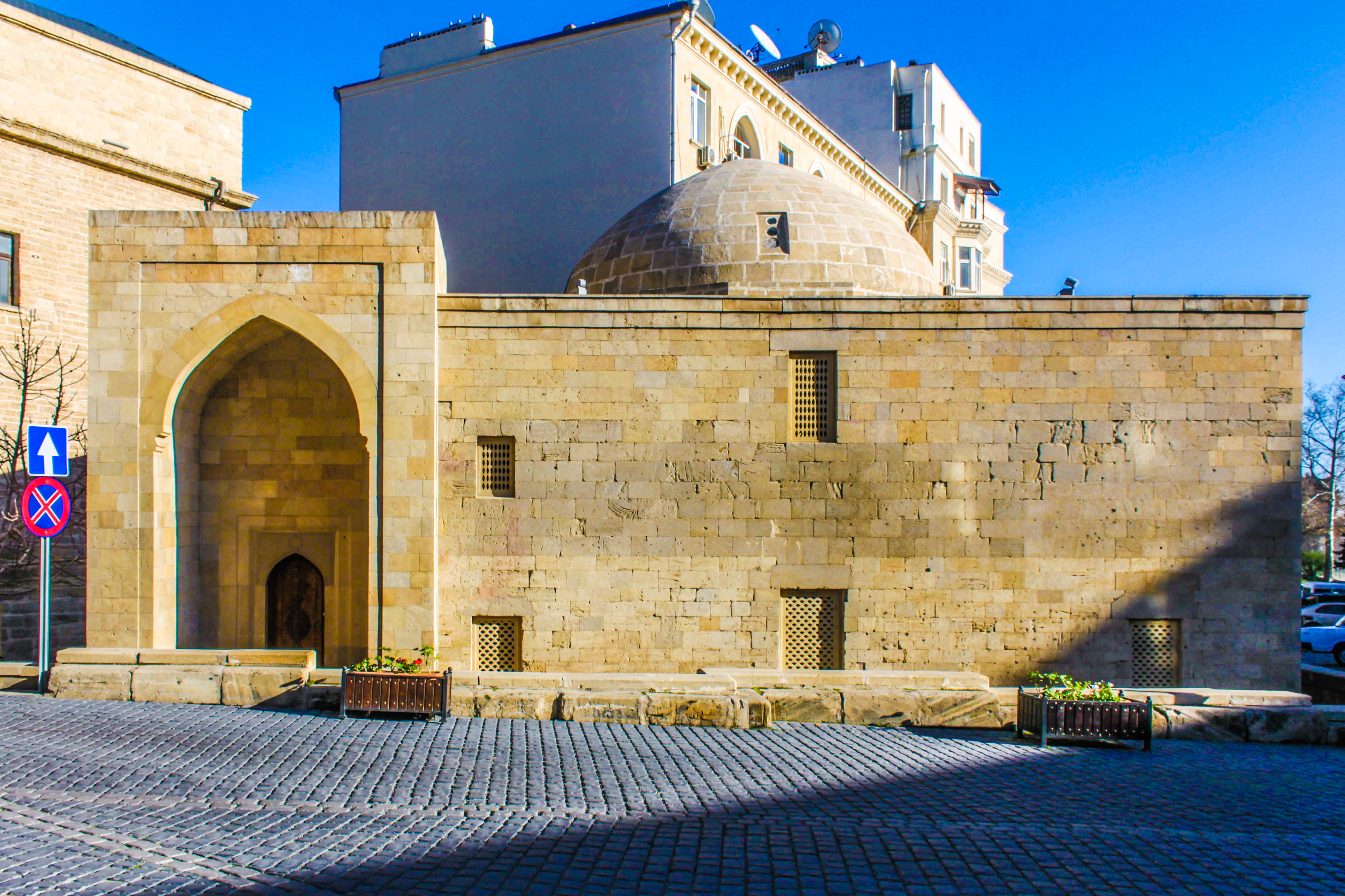 Seyid Murtuza Yəhya Məscidi